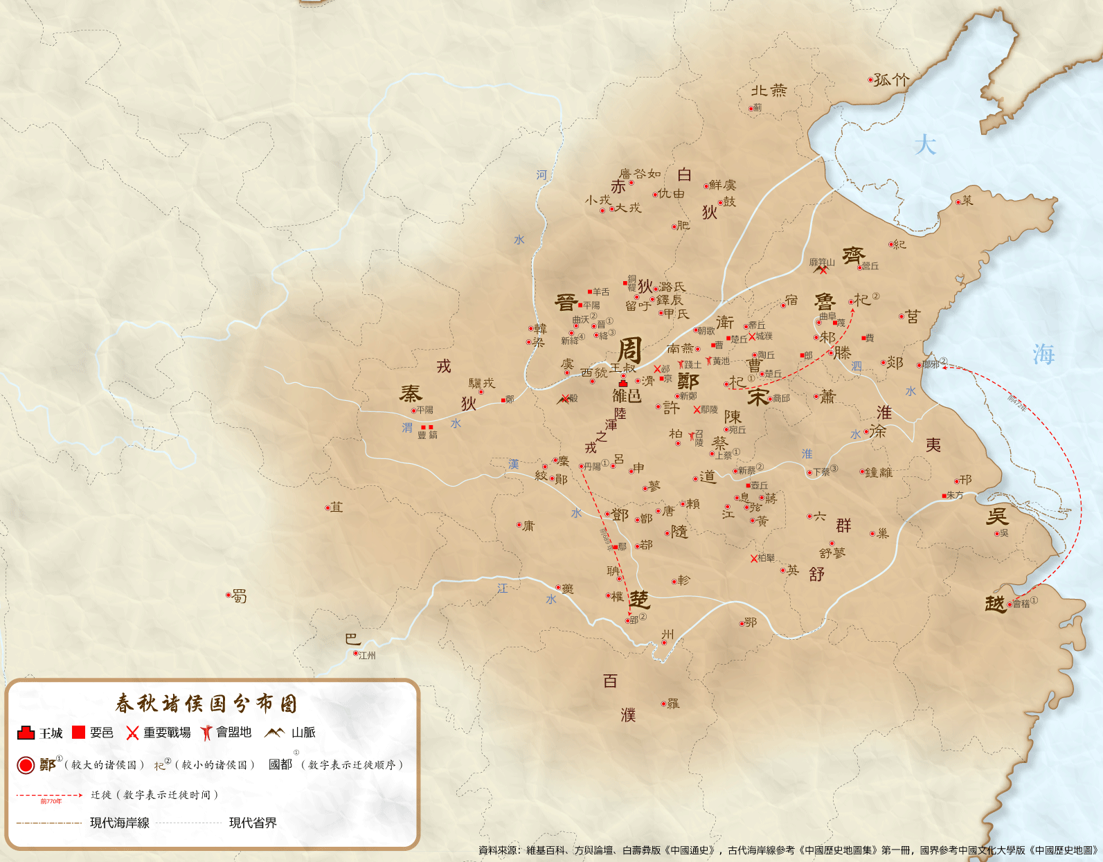 春秋諸侯國分佈圖 文言: 春秋列國輿圖